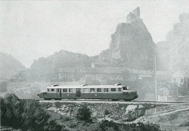 Autorail Decauville X 52000 sur la ligne des Alpes.